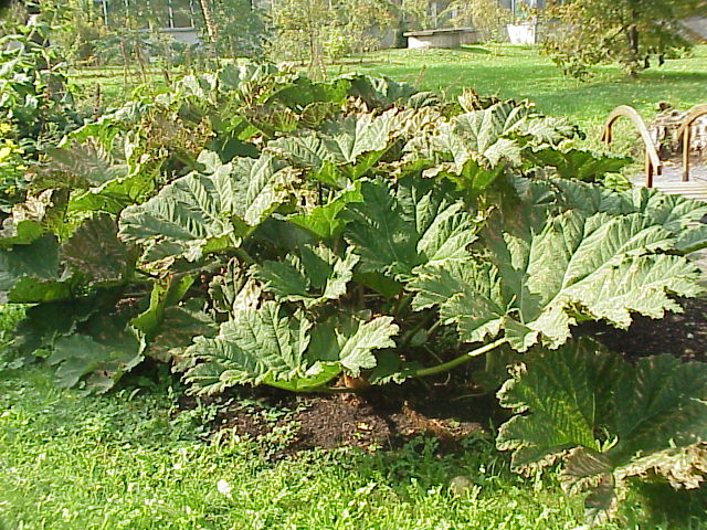 Name Gunnera manicata Family Haloragaceae Image no. 4